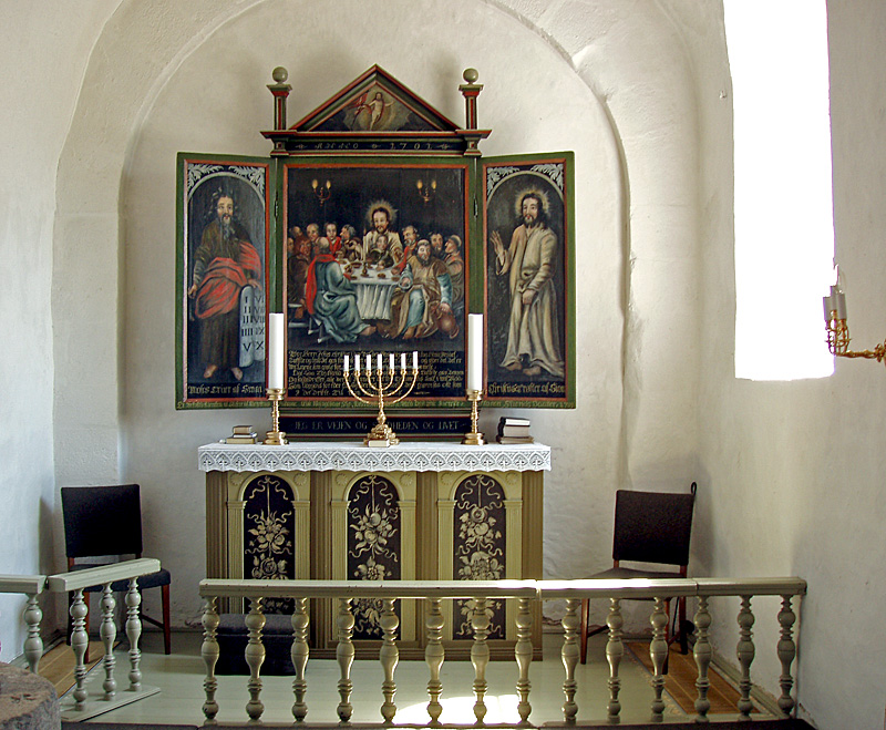 Kor og alter i Borum Kirke, Århus Kommune, Denmark